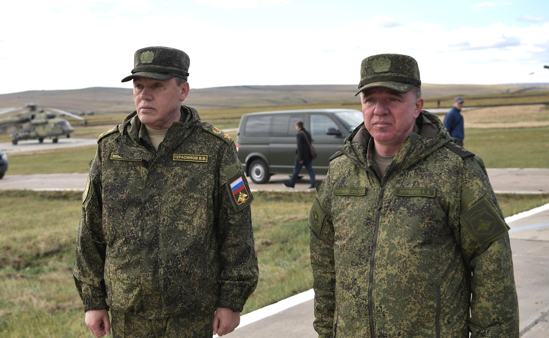 Начальник Генерального штаба Вооружённых Сил – первый заместитель Министра обороны Валерий Герасимов и Командующий войсками Восточного военного округа Александр Журавлёв (справа) на военных манёврах «Восток-2018».